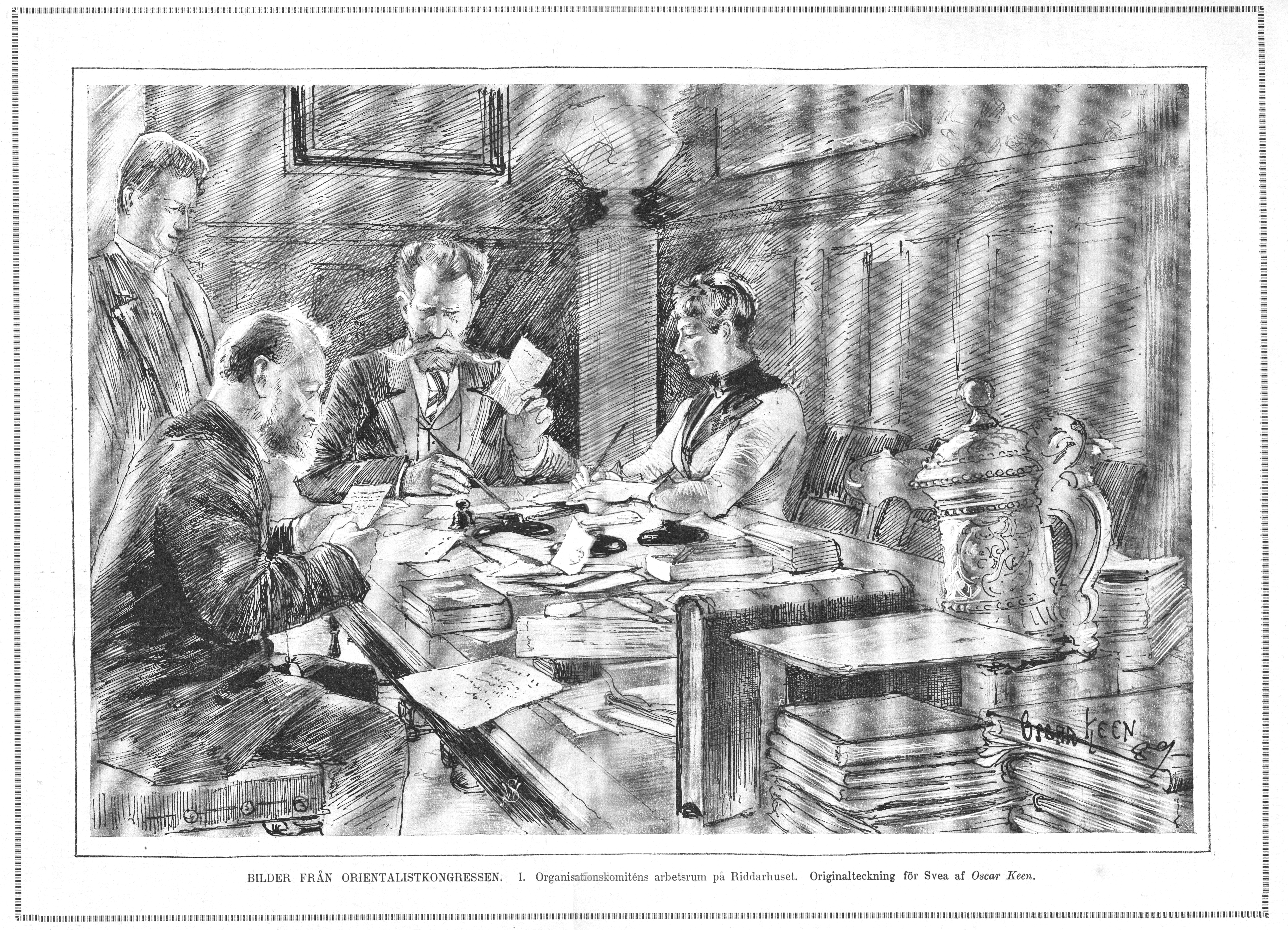 Den VIII:de internationella orientalkongressen i Stockholm och Oslo 1889. Bild från tidskriften Svea 1889.